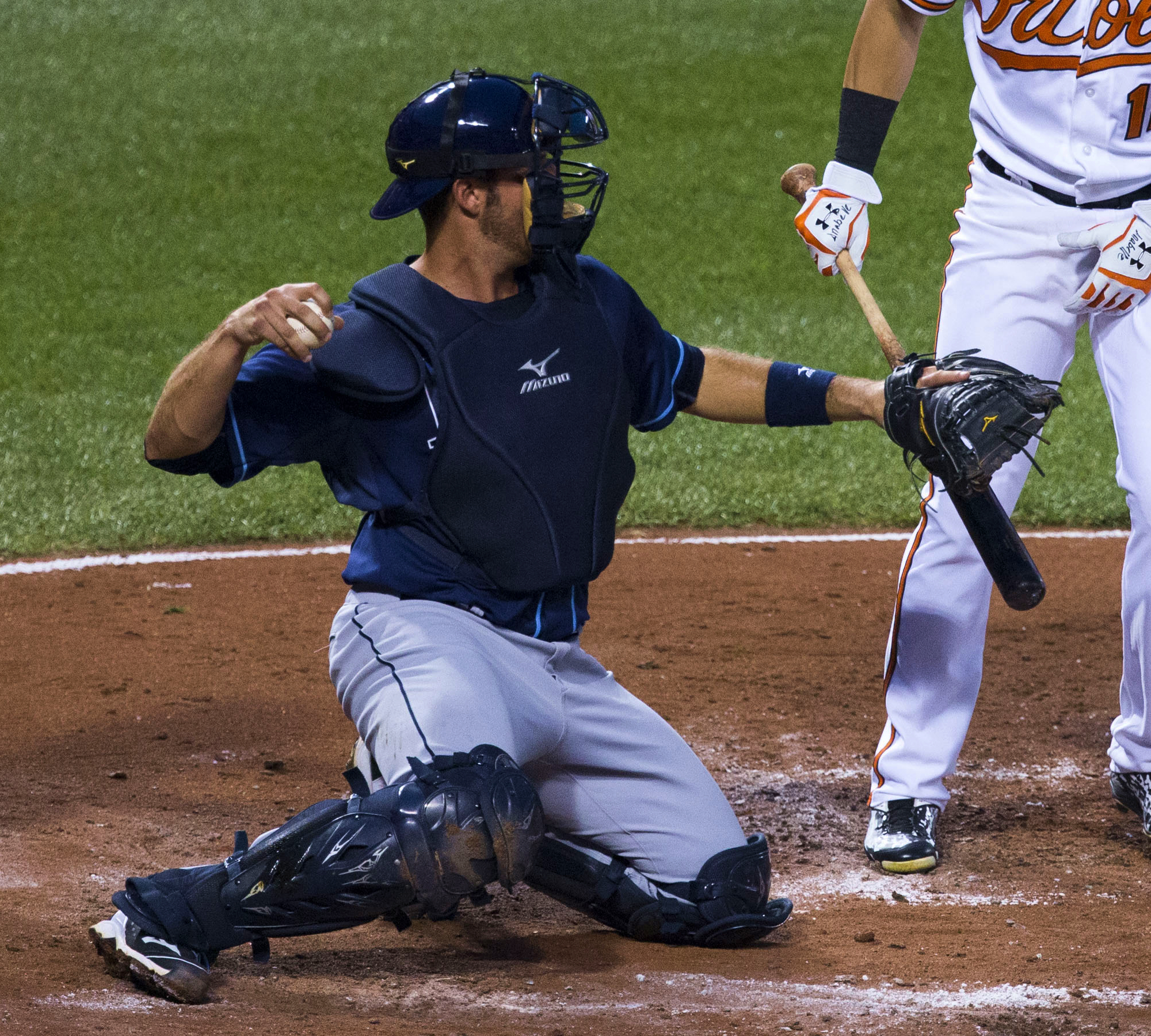 J. P. Arencibia